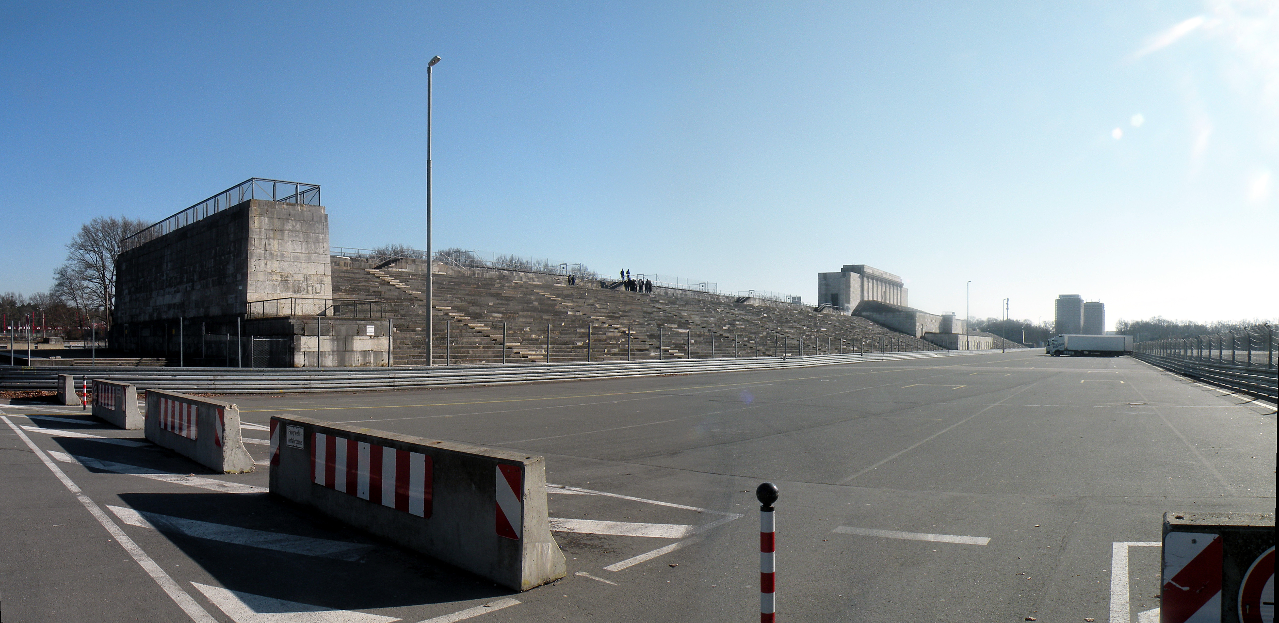 Нюрнберг.Трибуна_Цеппелина.